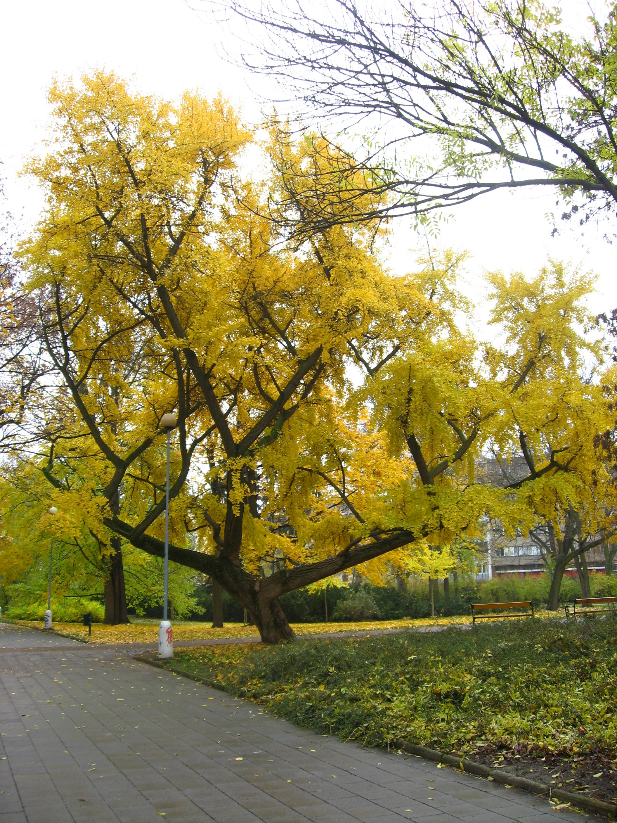 jinan dvoulaločný, Brno-LužánkyLatina: Ginkgo biloba